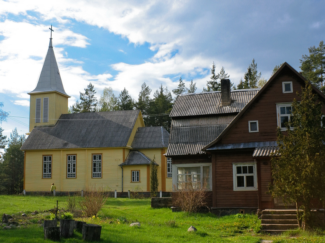 Inkūnai, Anykščiai district, Lithuania